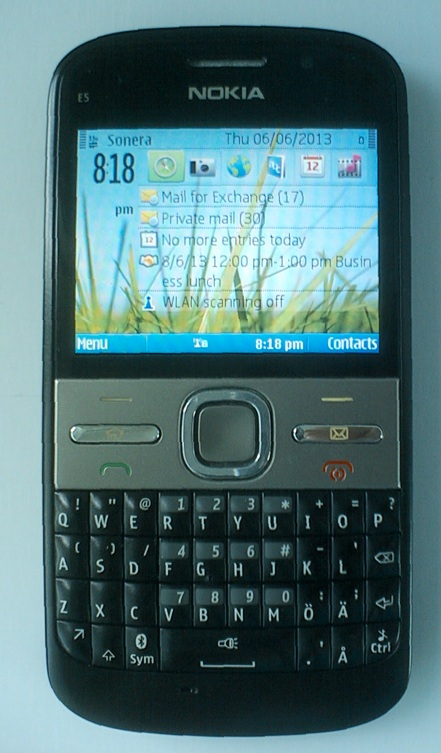 Nokia E5 -matkapuhelin